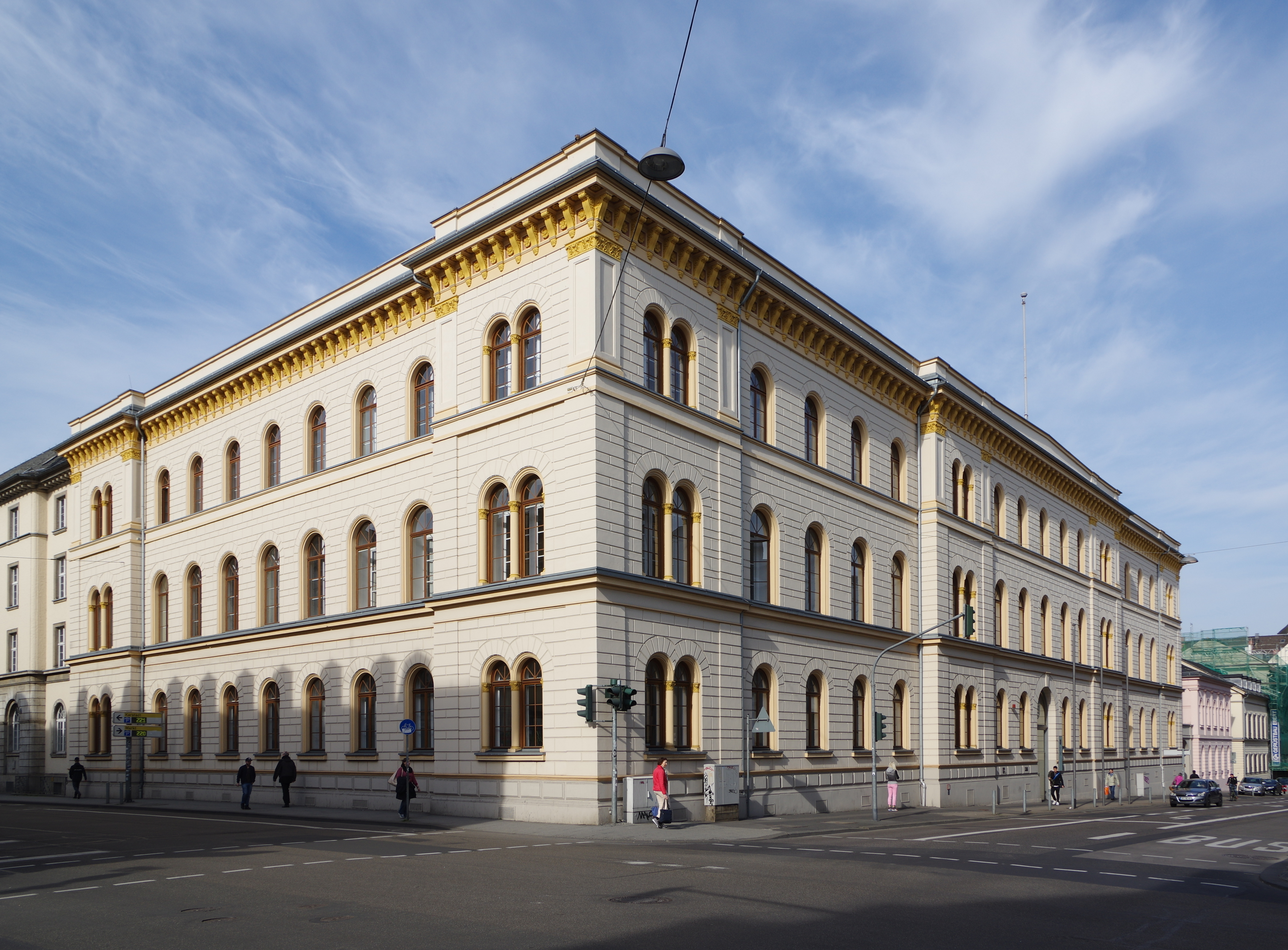 Deutschland, Wiesbaden, Luisenstraße 13/ Bahnhofstraße,Ehem. Ministerialgebäude